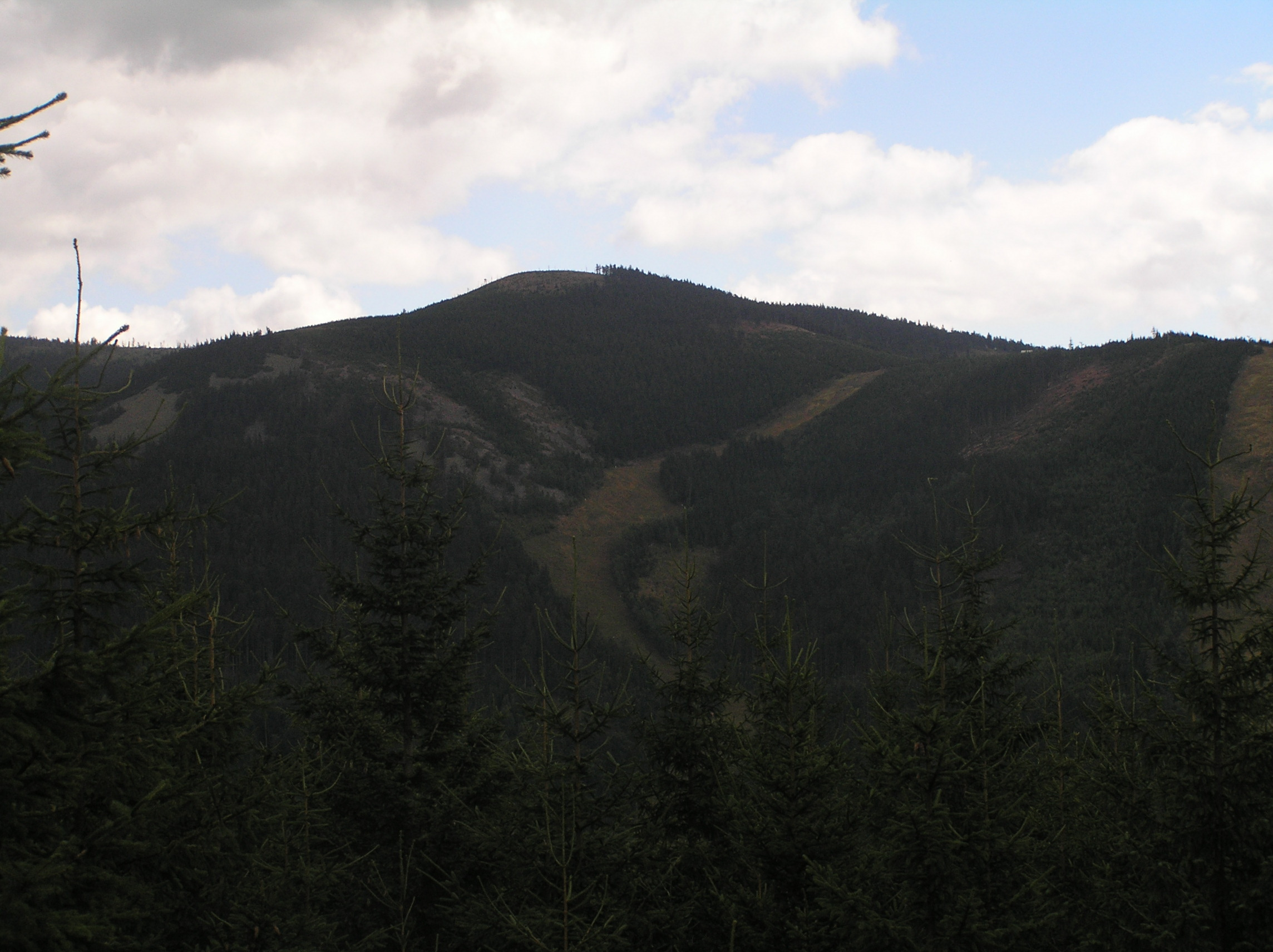 Sviní hora (Slamník) (1232 m), the Králický Sněžník Mountains, Poland and Czech Republic